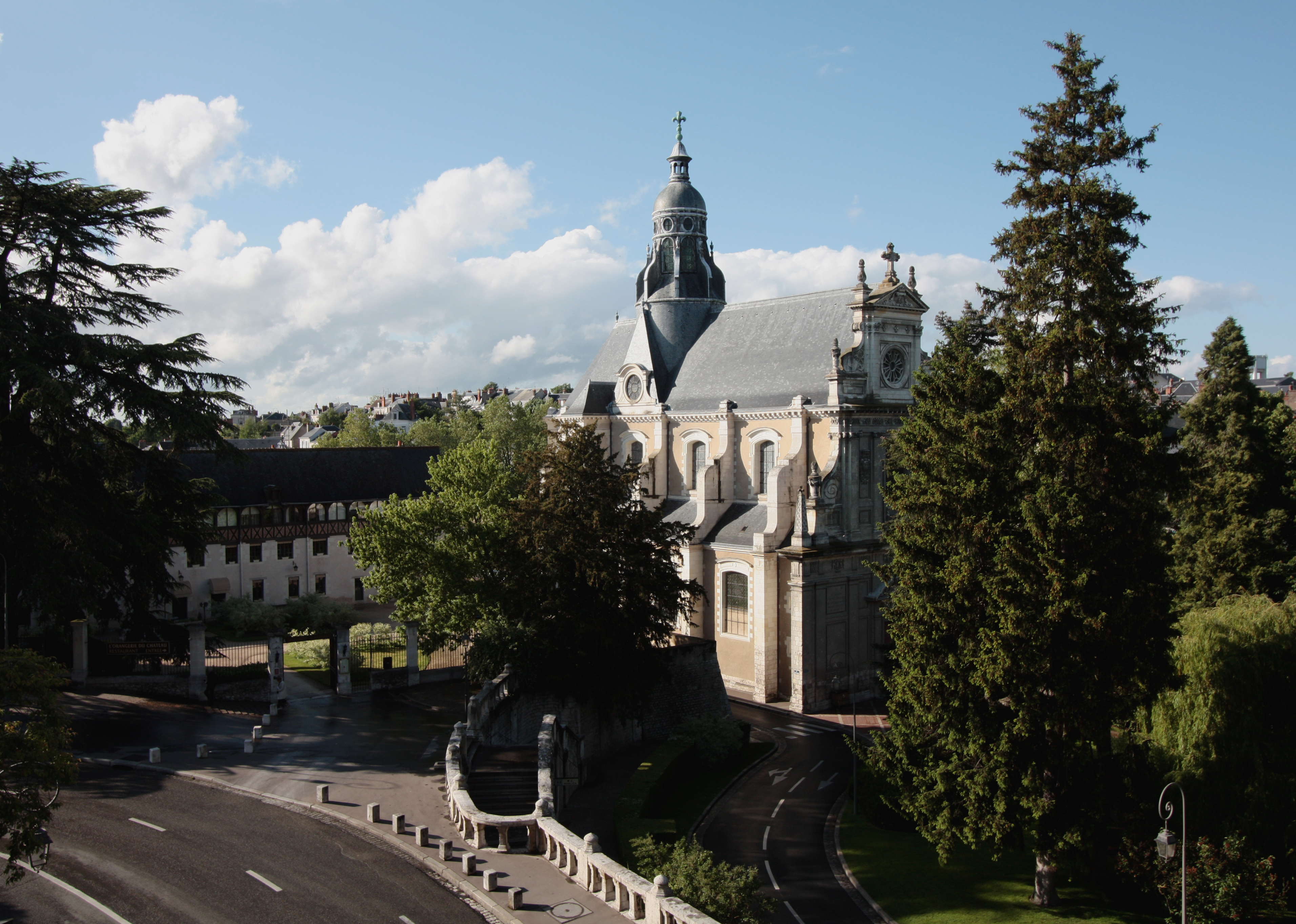 Sstadt Blois, Departement Loir-et-Cher/Frankreich - Kirche Saint-Vincent-de-Paul an der Place Victo-Hugo